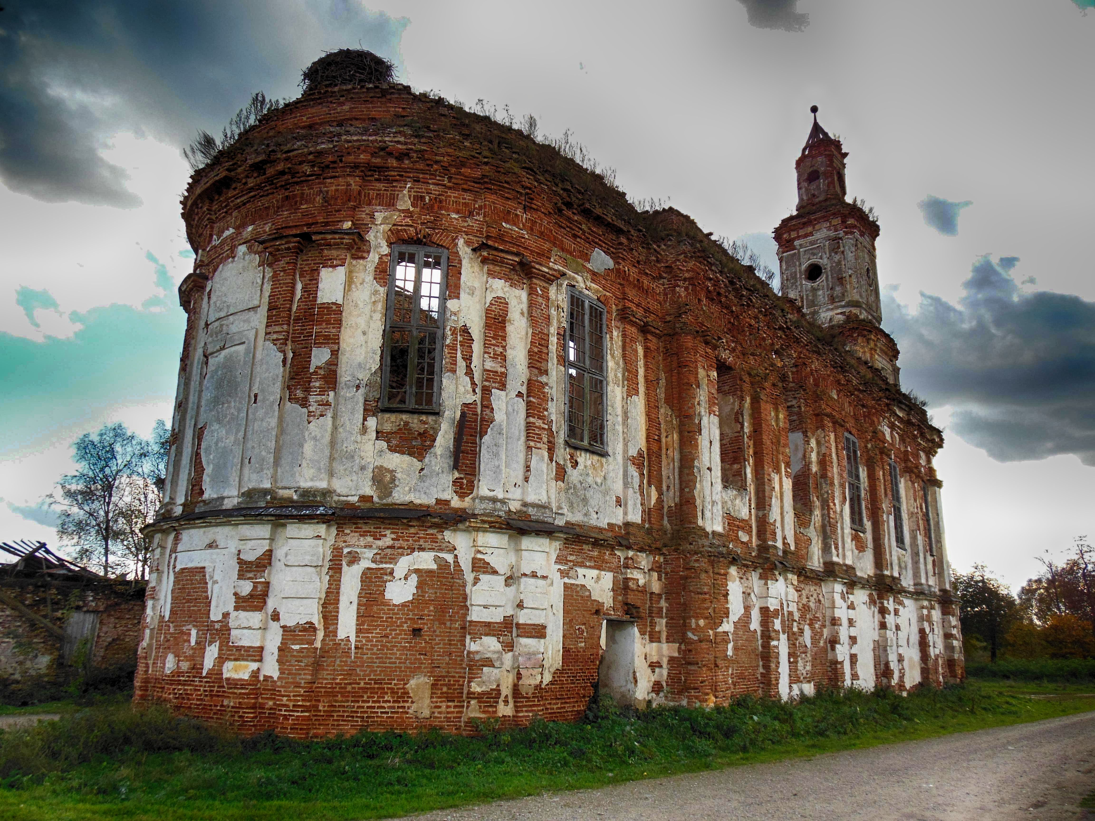 Беларуская (тарашкевіца): Царква. в. Сялец (Ануфрыева) This is a photo of Belarusian heritage monument. Reference number: 512Г000518 ( WLM)